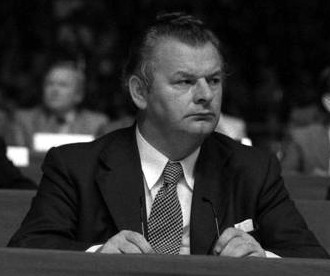 Anton Jaumann auf dem CSU – Wahlkongress 1976 in München in der Olympiahalle